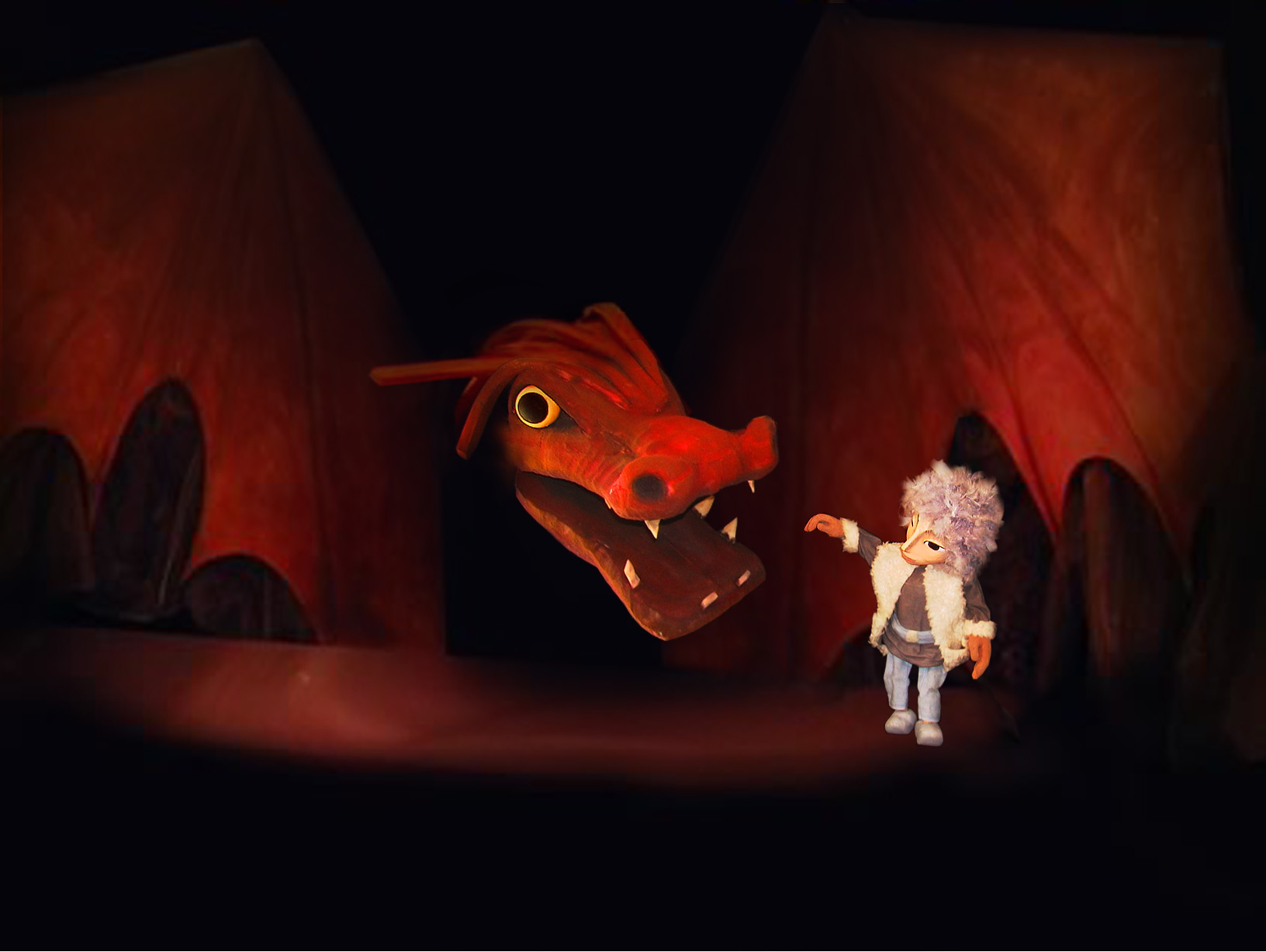 Tischmarionette, Klappmaulfigur (Figurentheater Winter, Eine Hand voll Drachenfeuer)